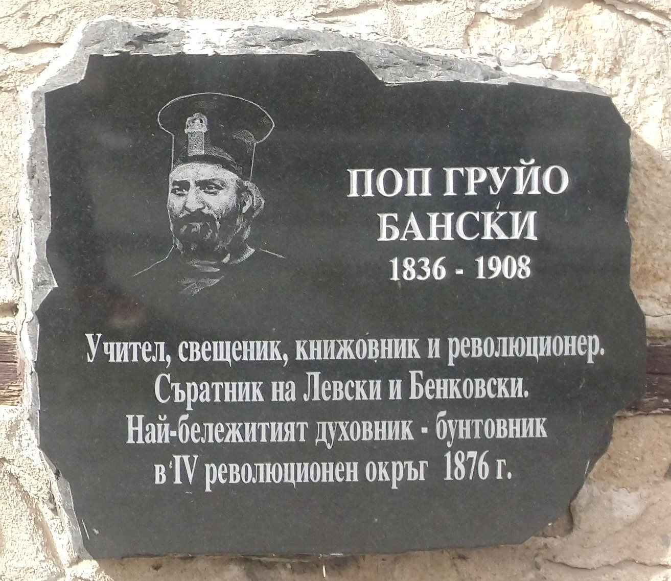 Поп Груйо Бански (1836 - 1908) - плоча в Исторически музей Панагюрище - Надпис: Учител, свещеник, книжовник и революционер. Съратник на Левски и Бенковски. Най-бележитият духовник-бунтовник в IV революционен окръг 1876 г.